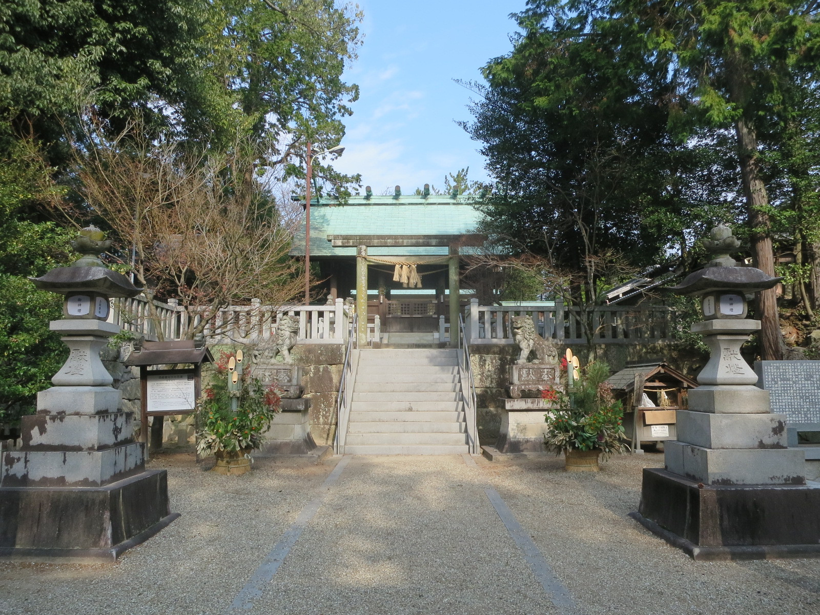 稲前神社（岡崎市稲熊町）